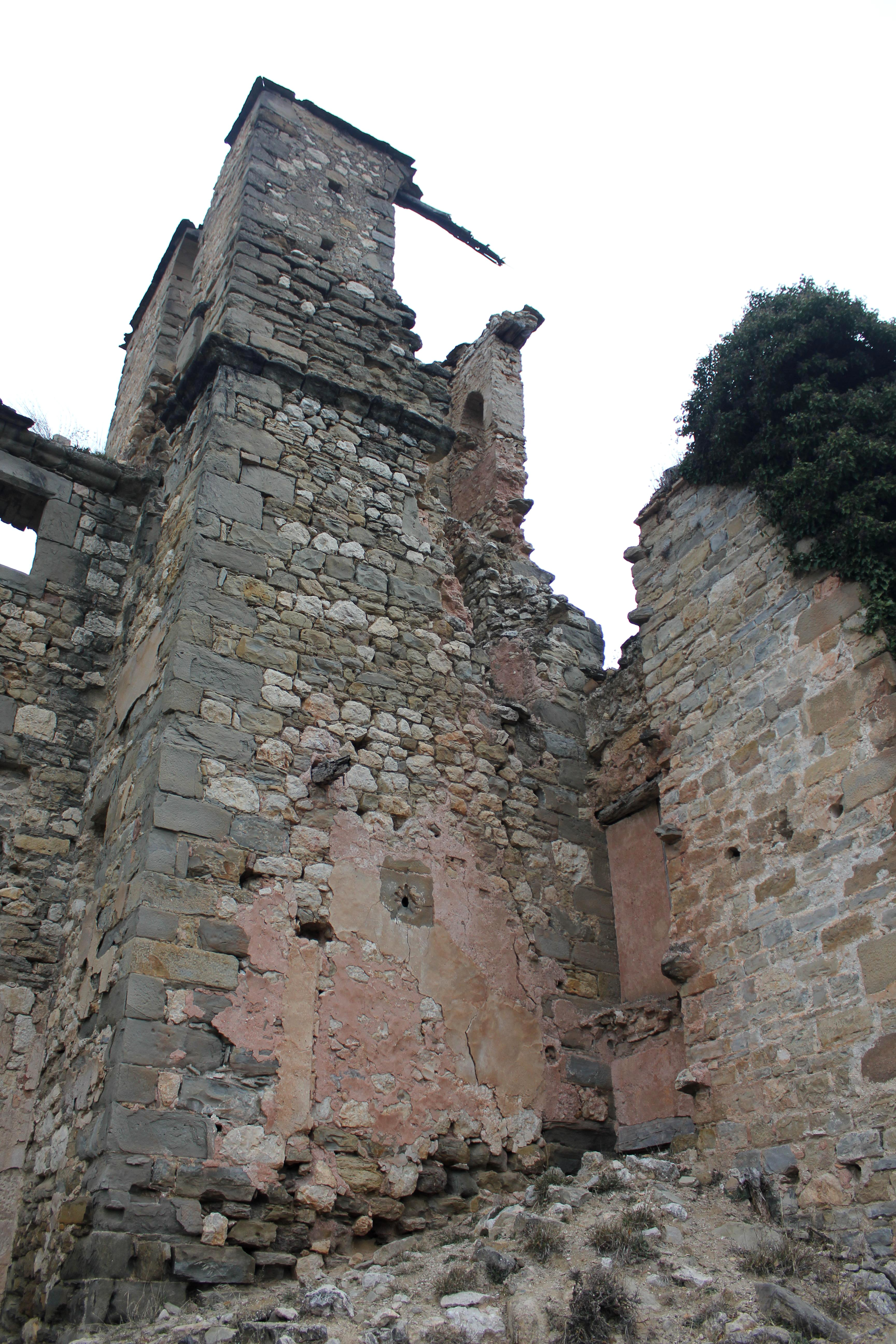 Aragonés: O campanal espaldau d'a ilesia de A Penilla (A Fueva, Sobrarbe).